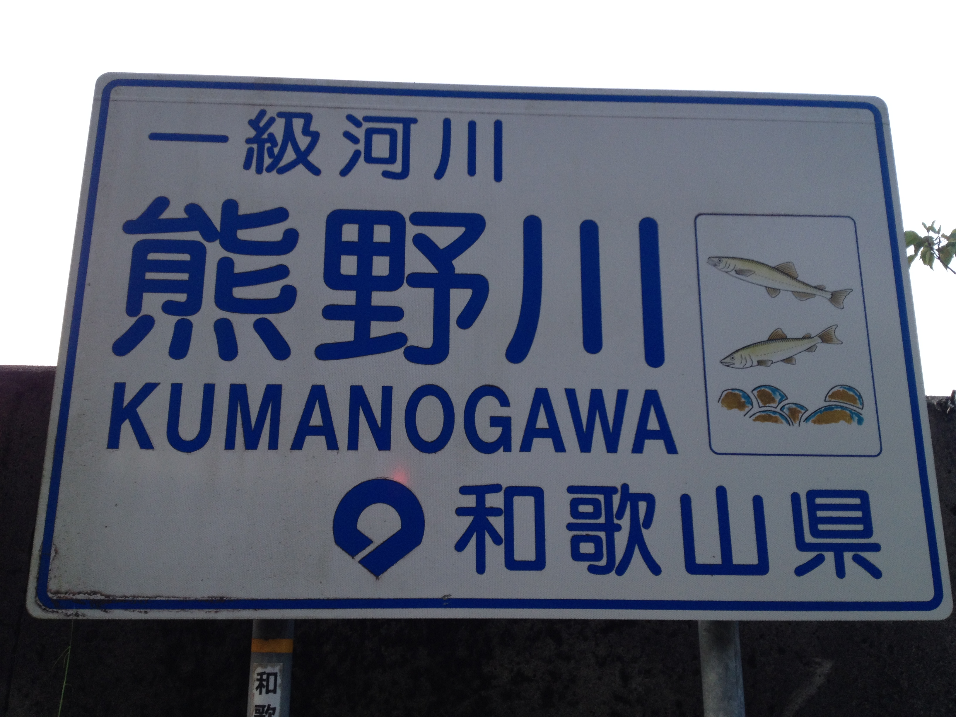 Kumanogawa - near Hongu Taisha